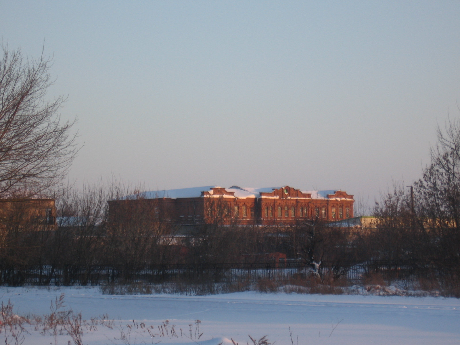 Без названия